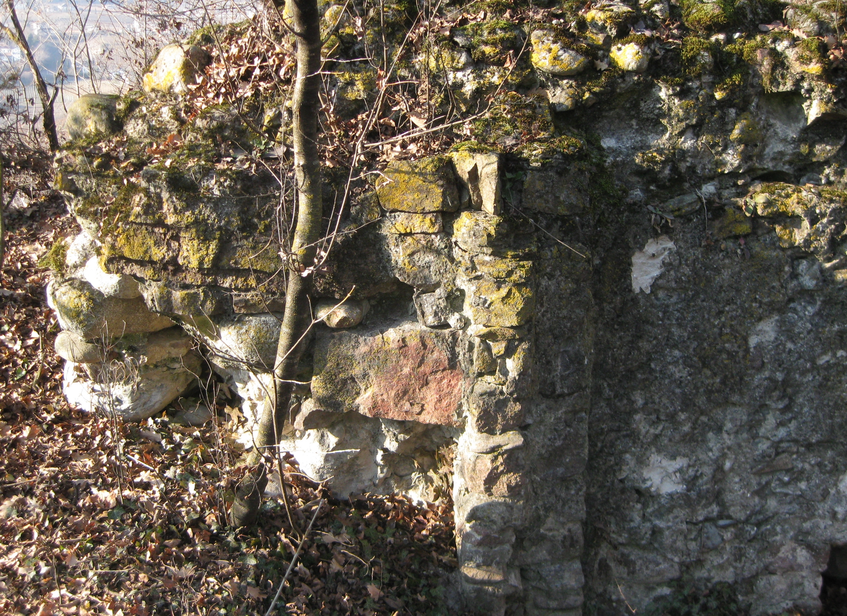 Spärliche Mauerreste der alten Burg Gruonsberg (Greinsberg, Grumsberg) bei Girlan in Eppan (Südtirol)